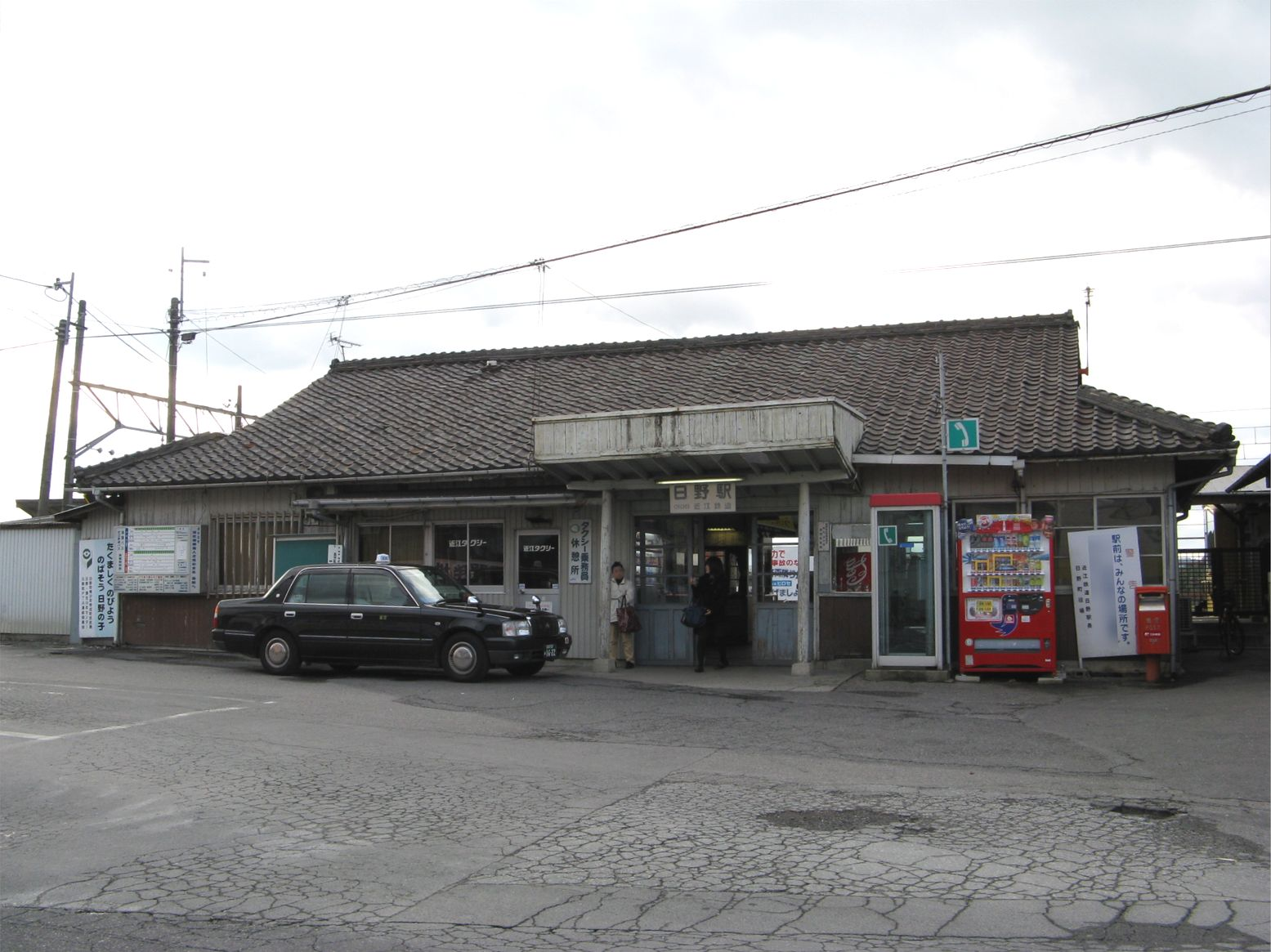 近江鉄道本線 日野駅 駅舎